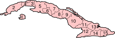 Cuba Suddivisioni amministrative (1976-2010) Cuba Image:CubaSubdivisions.png